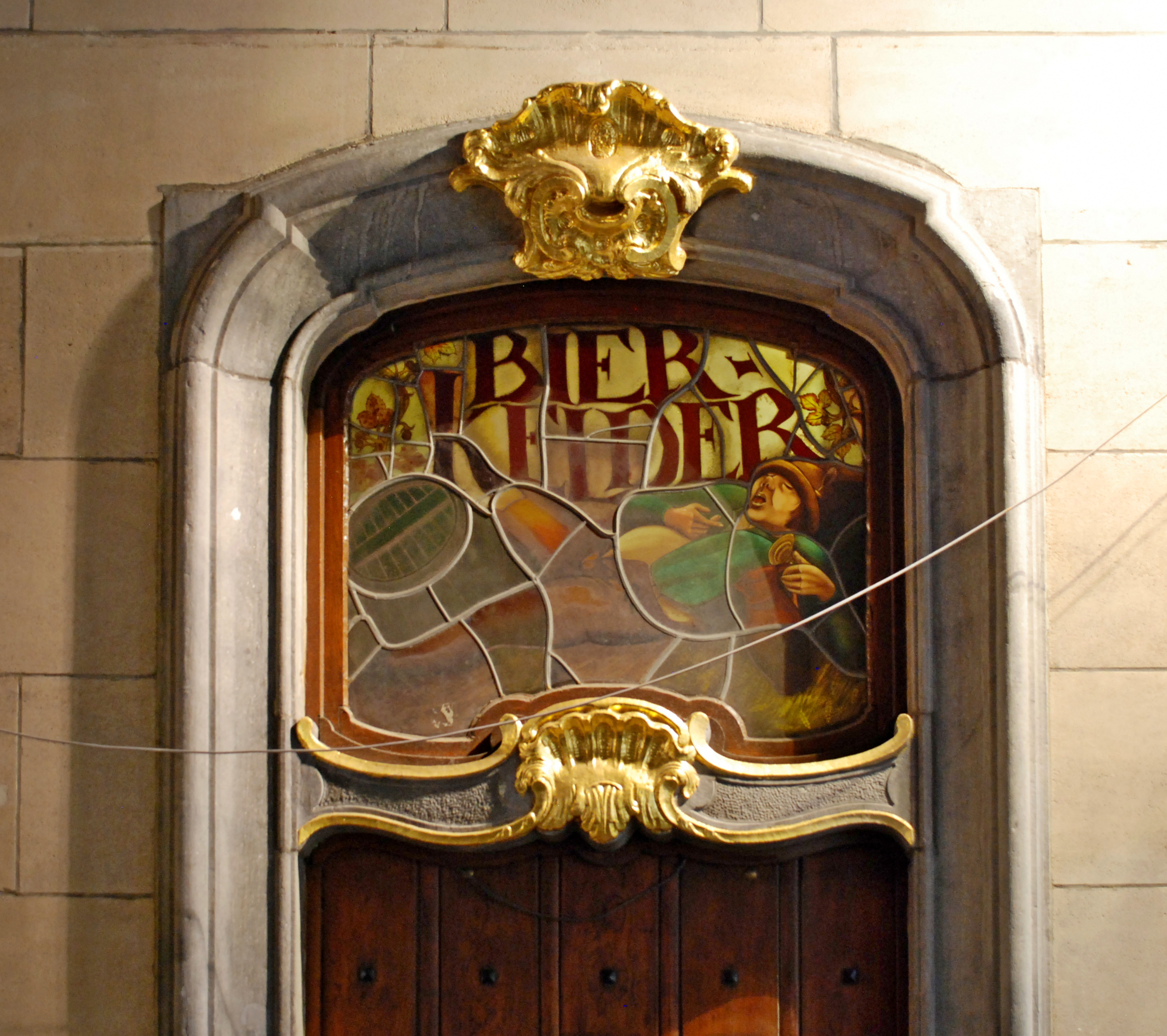 Belgique - Bruxelles - Maison du Roi d'Espagne - porte latérale "Bierkelder" (rue au Beurre)